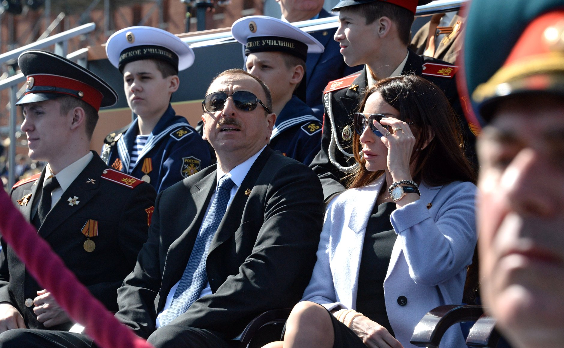 Президент Азербайджанской Республики Ильхам Алиев с супругой во время военного парада в ознаменование 70-летия Победы в Великой Отечественной войне 1941–1945 годов.